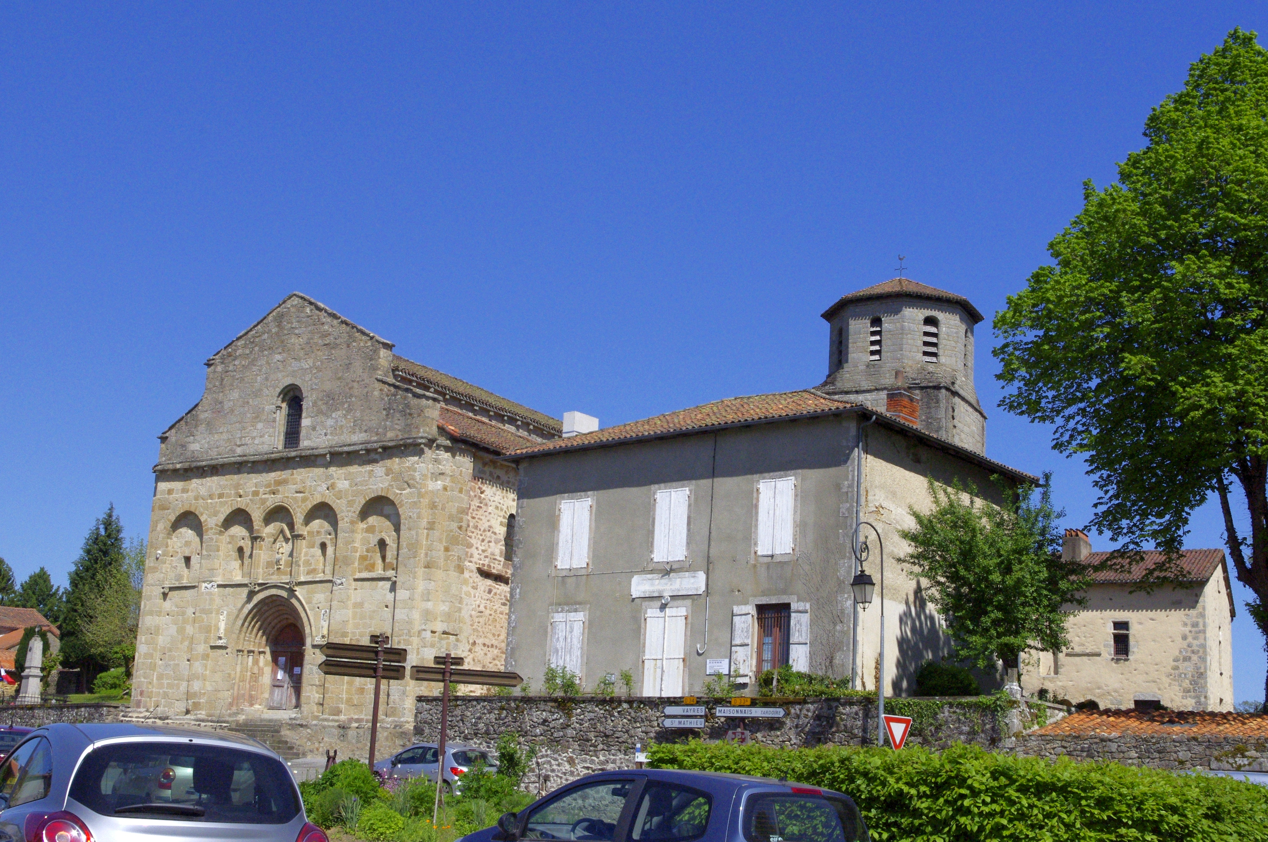 Les Salles-Lavauguyon l'église Saint Eutrope avec en arrière plan le prieuré et sur la gauche le monument aux morts.